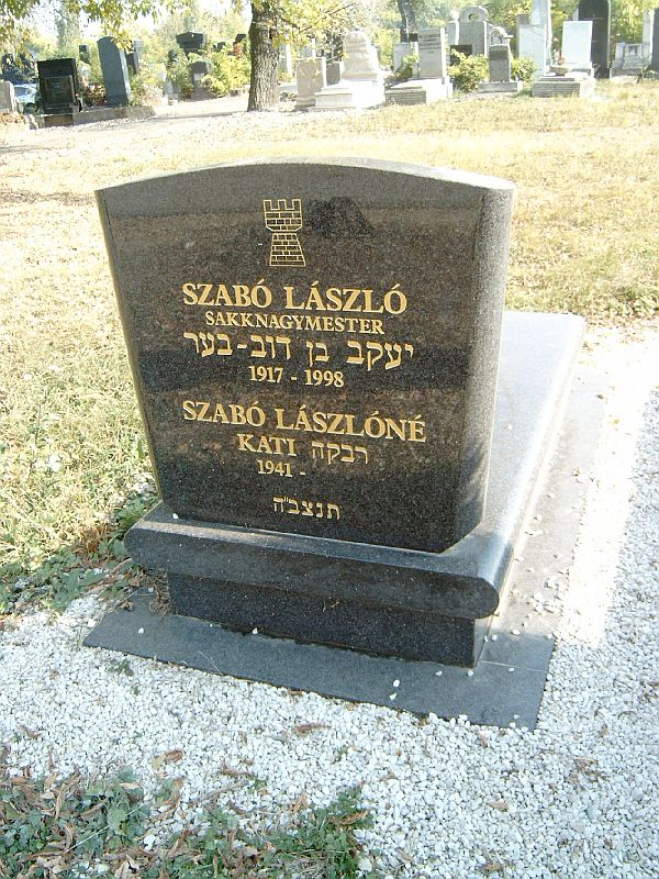 Szabó László (Budapest, 1917. március 19. – 1998. augusztus 8.), magyar sakkozó, nemzetközi nagymester sírja Budapesten. Kozma utcai izraelita temető: 5B-2-36.